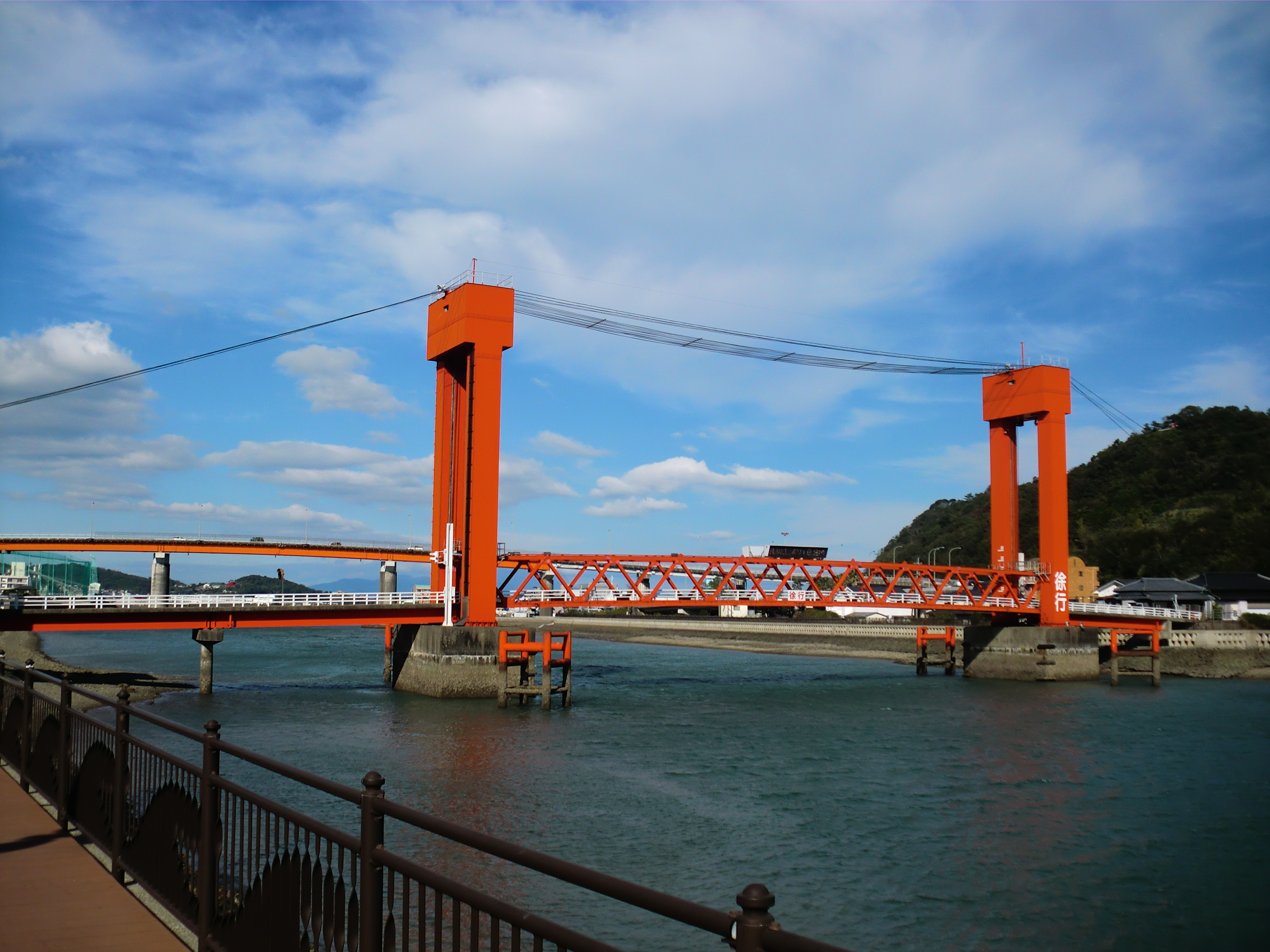 本渡瀬戸歩道橋（左岸が下島、右岸が上島）